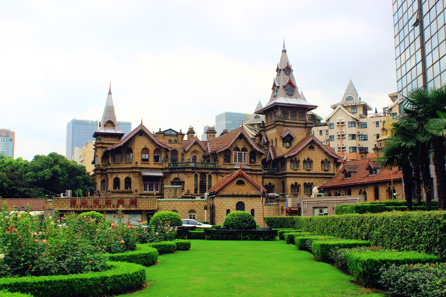 中文（中国大陆）: 上海马勒别墅